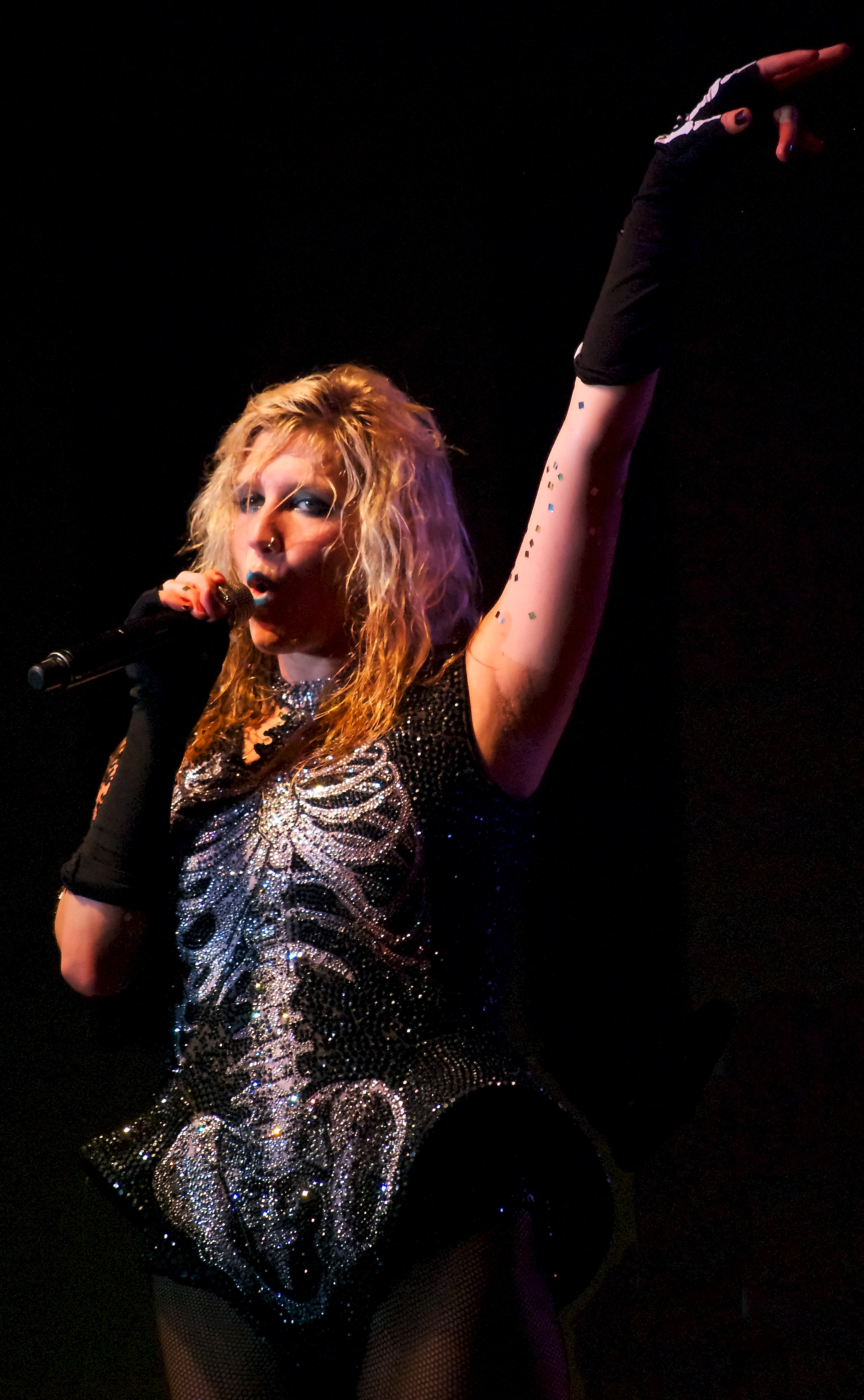 Ke$ha performing "Tik Tok" at SUNY